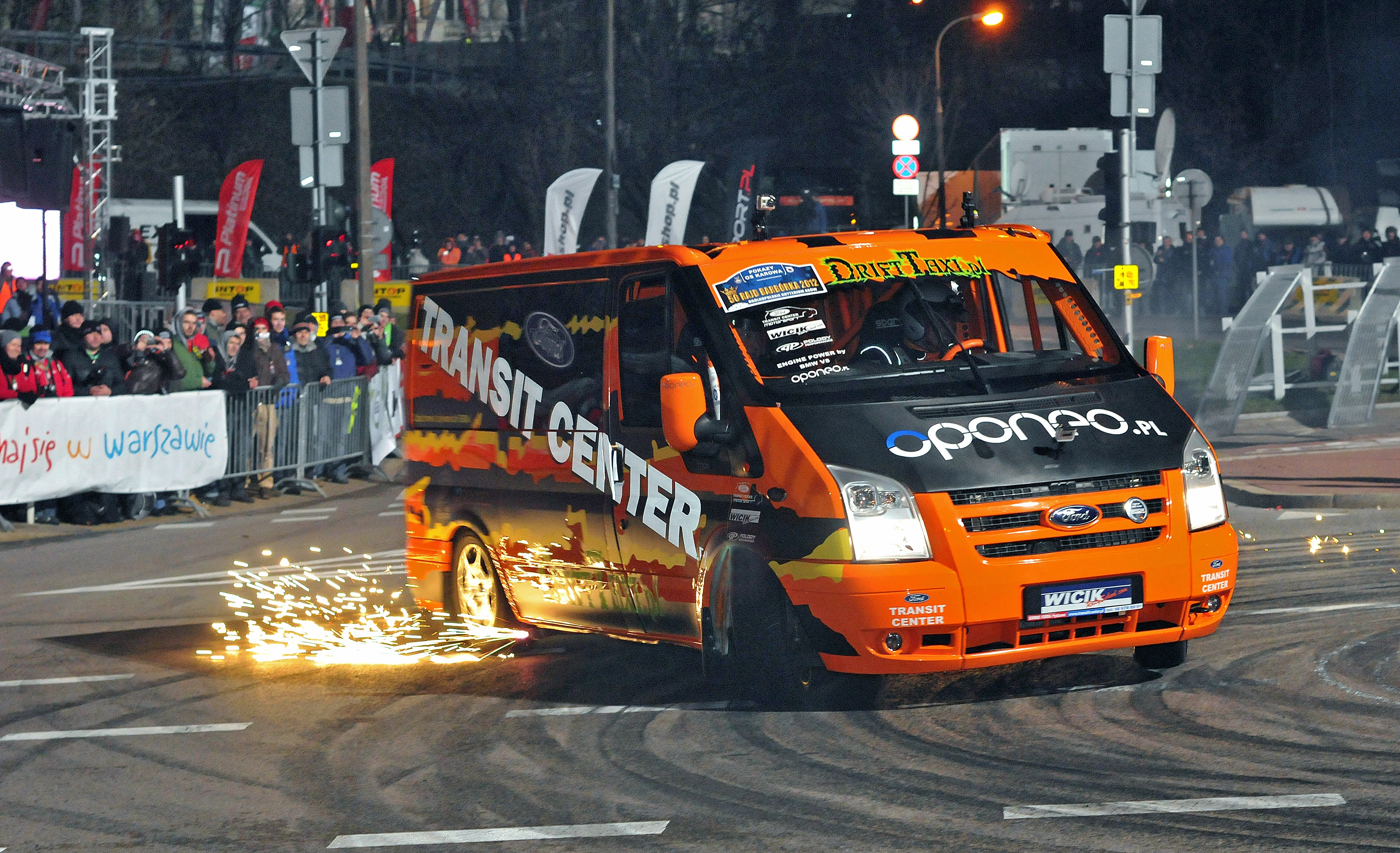 Pierwszy na świecie samochód dostawczy przeznaczony do driftów.